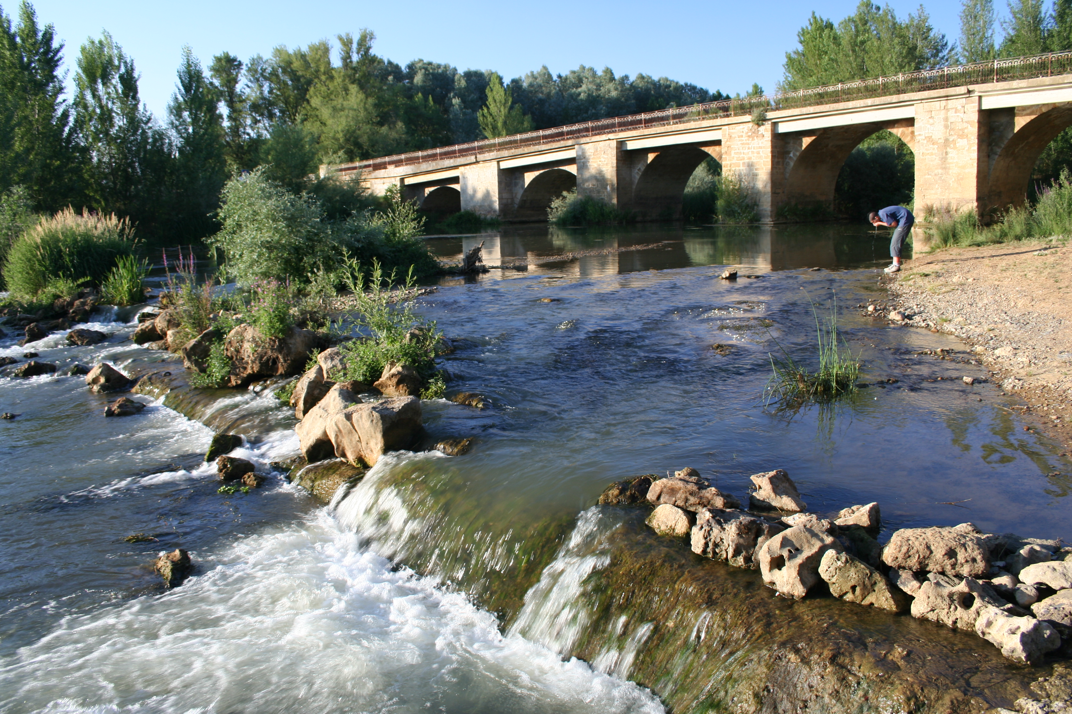 El puente sobre el río Cea a su paso por Mayorga.